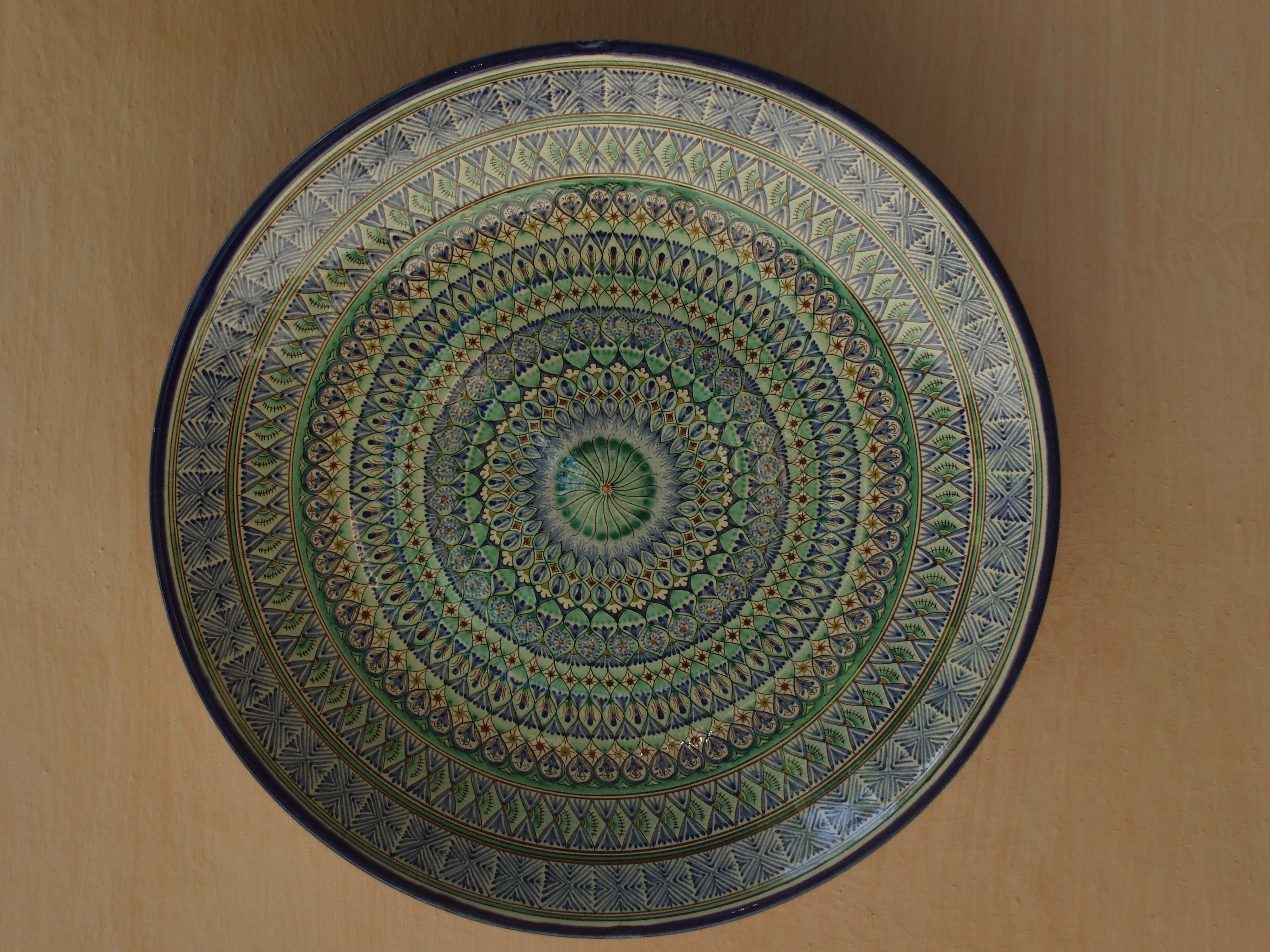 Rishton-Keramik